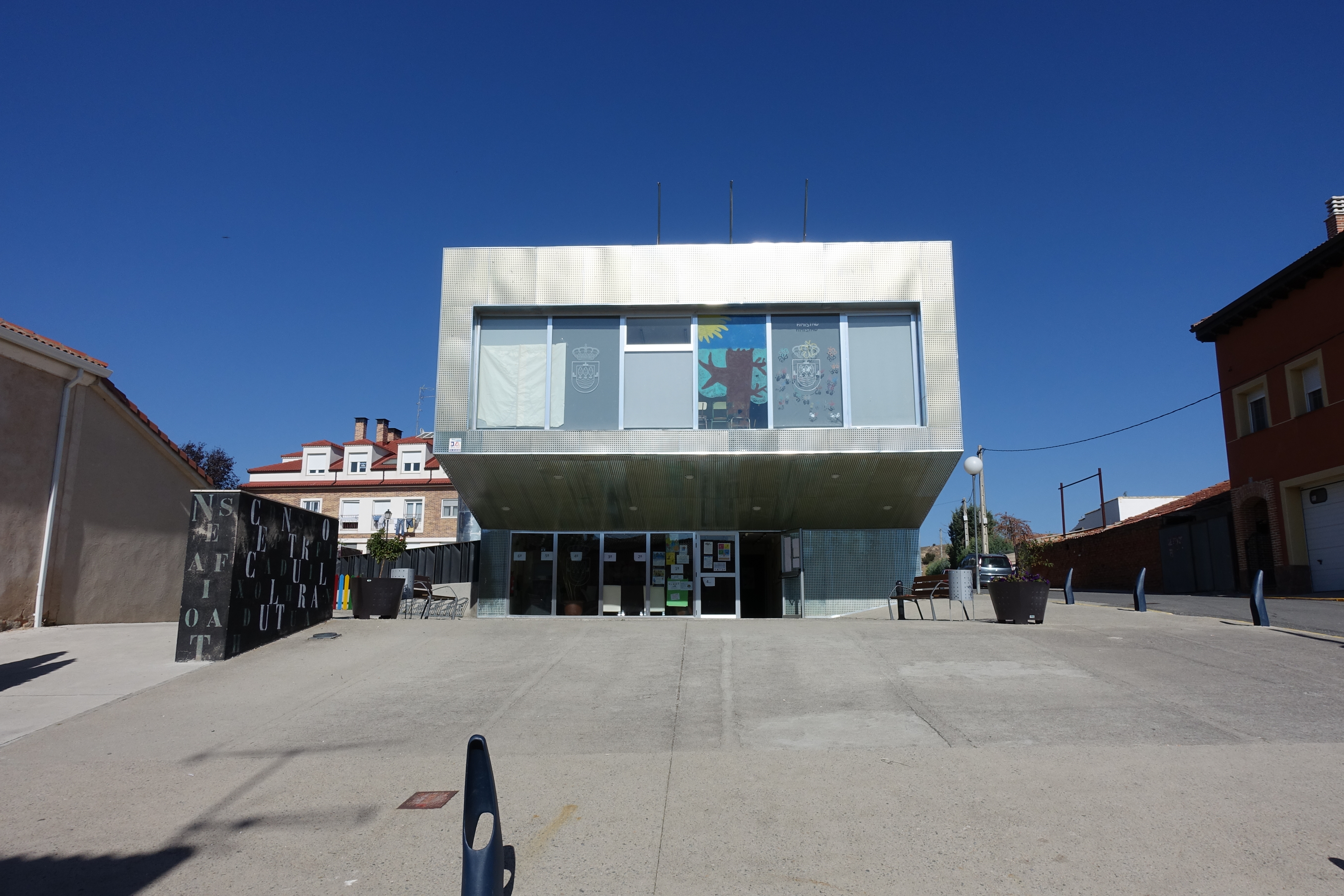 Centro cultural en Hontanares de Eresma (Segovia, España).